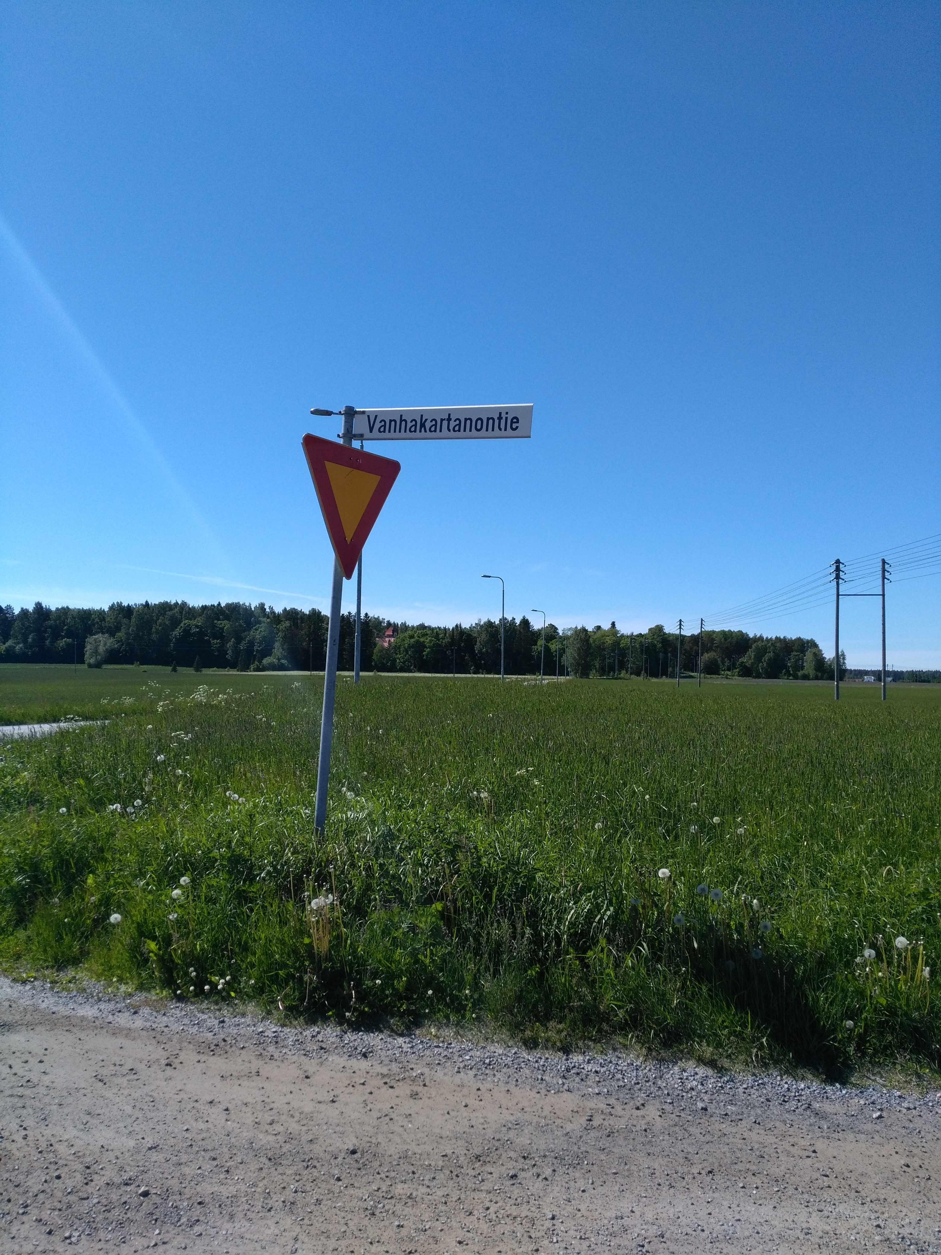 Vanhakartanontie, takana Vanhakartano